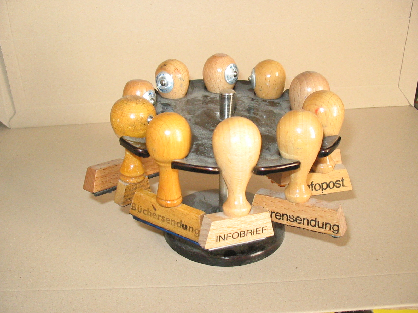 ein Stempelkarussel